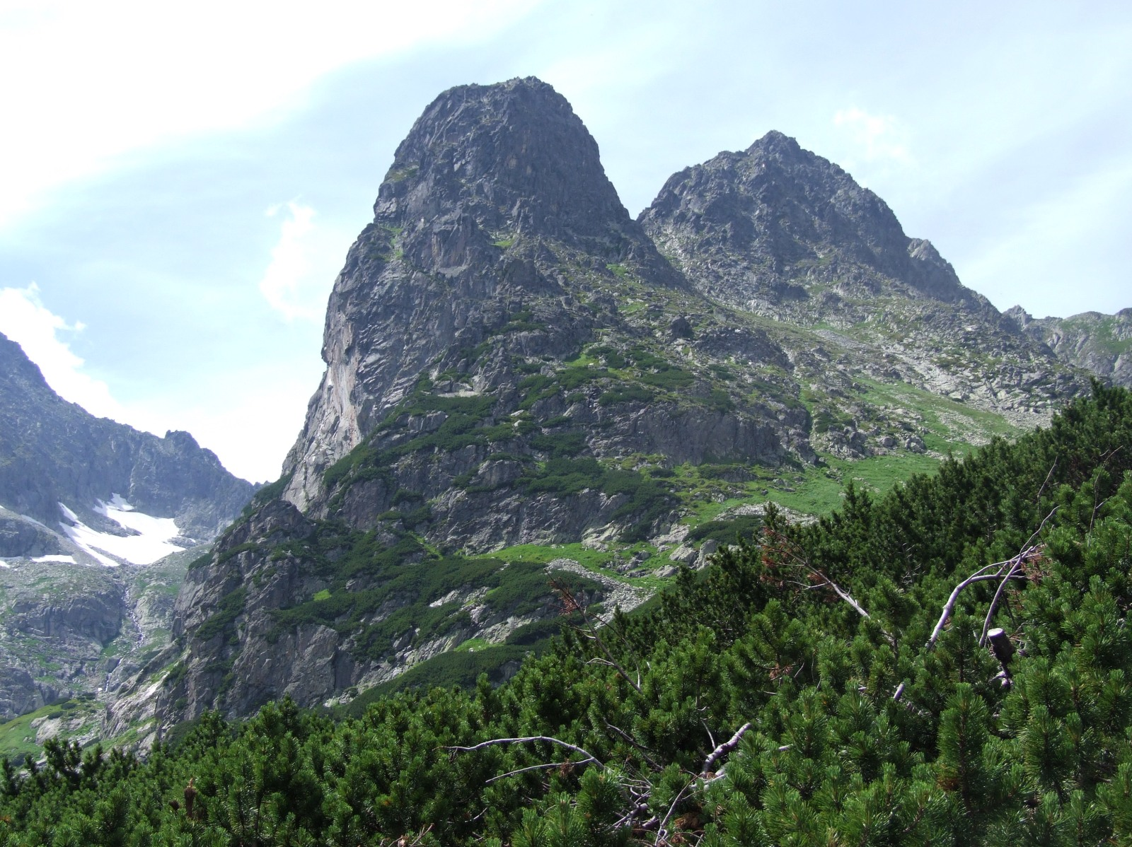 Od lewej: Jastrzębia Turnia i Czerwona Turnia. Widok z żółtego szlaku turystycznego od Zielonego Stawu Kieżmarskiego na Jagnięcy Szczyt